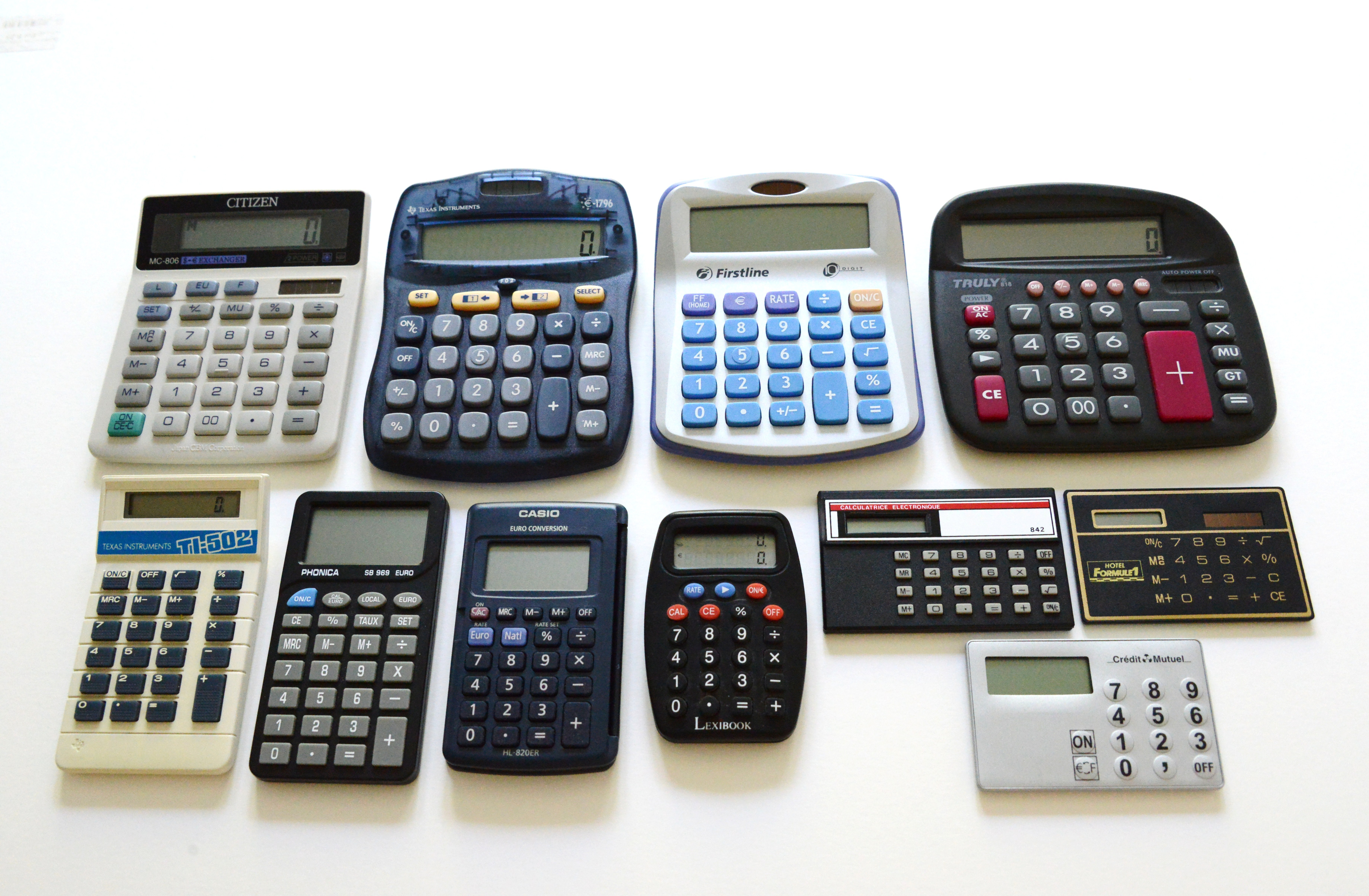 Un ensemble de 11 calculettes (calculatrices électroniques de petite dimension). Ces calculettes datent des années 1970 (Texas Instruments TI-502) aux années 2000 (Citizen MC-806). Les minicalculettes « Formule 1 » et « Crédit Mutuel » sont des petits cadeaux offerts respectivement par la chaine d’hôtels Formule 1 et la banque Crédit Mutuel. Les calculettes qui ne fonctionnent pas (pas de 0) ont leurs piles électriques hors service. Photographie prise à La Rochelle, France en août 2018.